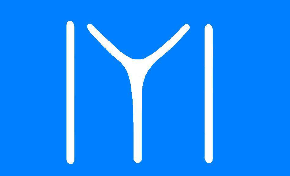 Mensup oldu Oğuzların KAYI boyunun tamgası